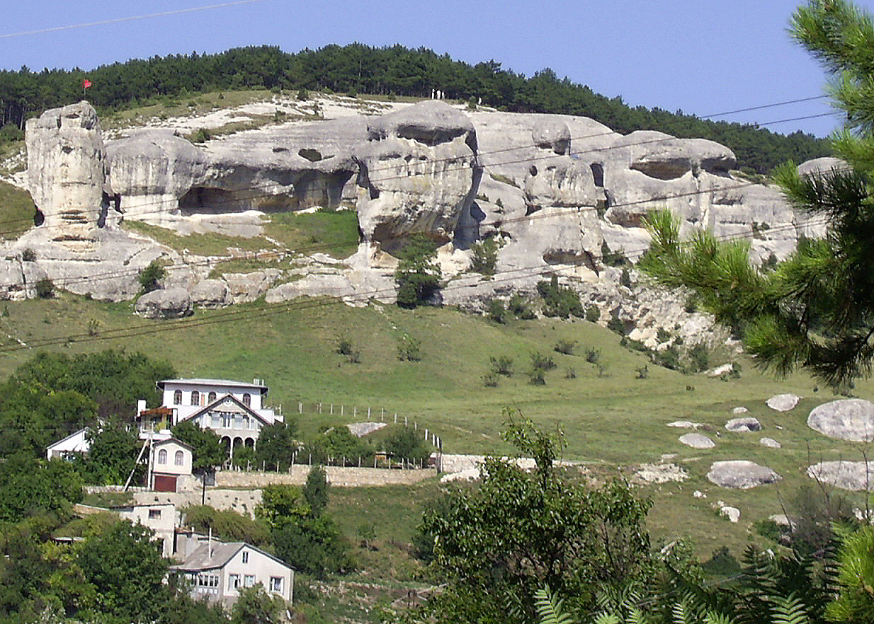 Сфинксы долины реки Чурук-Су. Бахчисарай